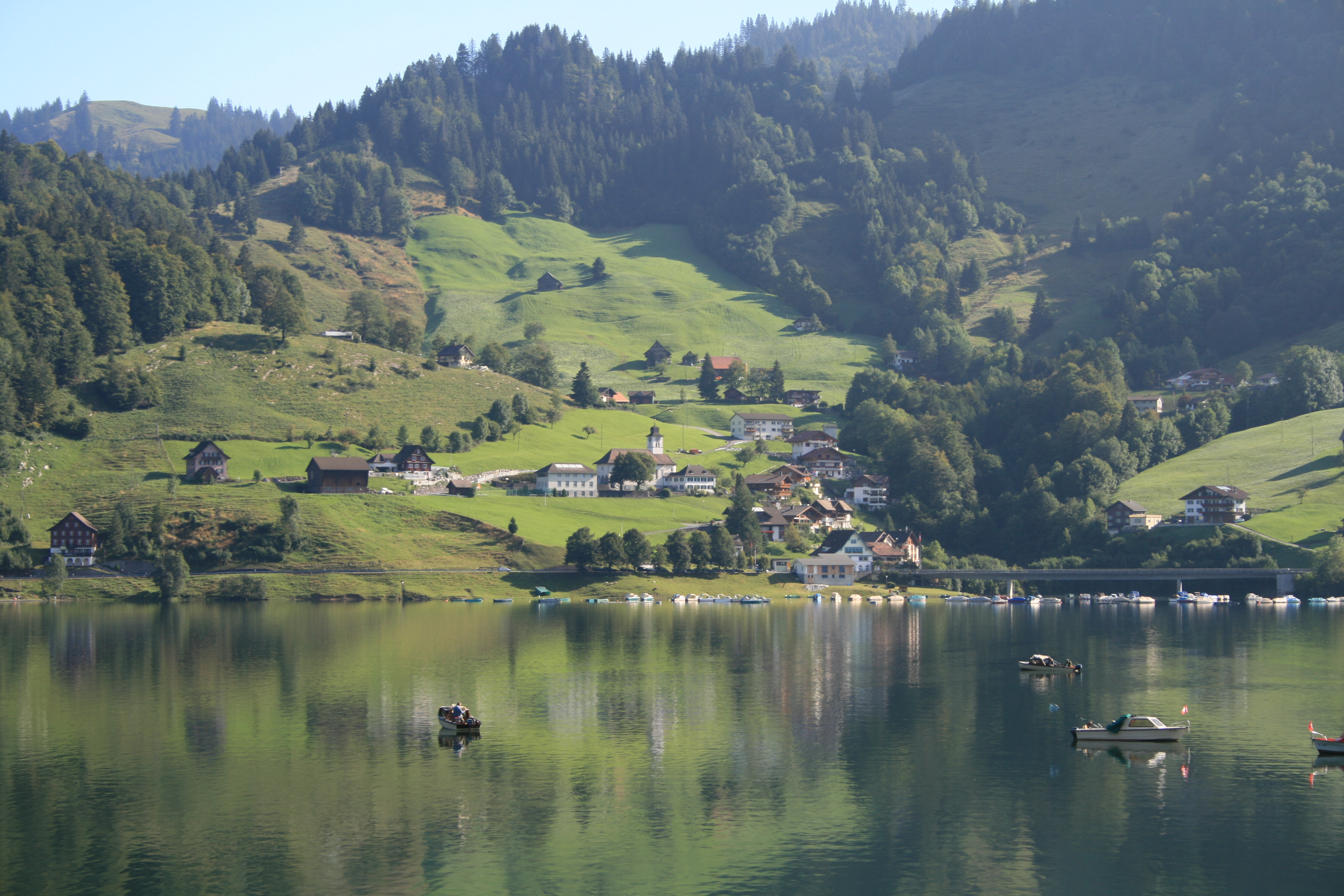 Innerthal SZ